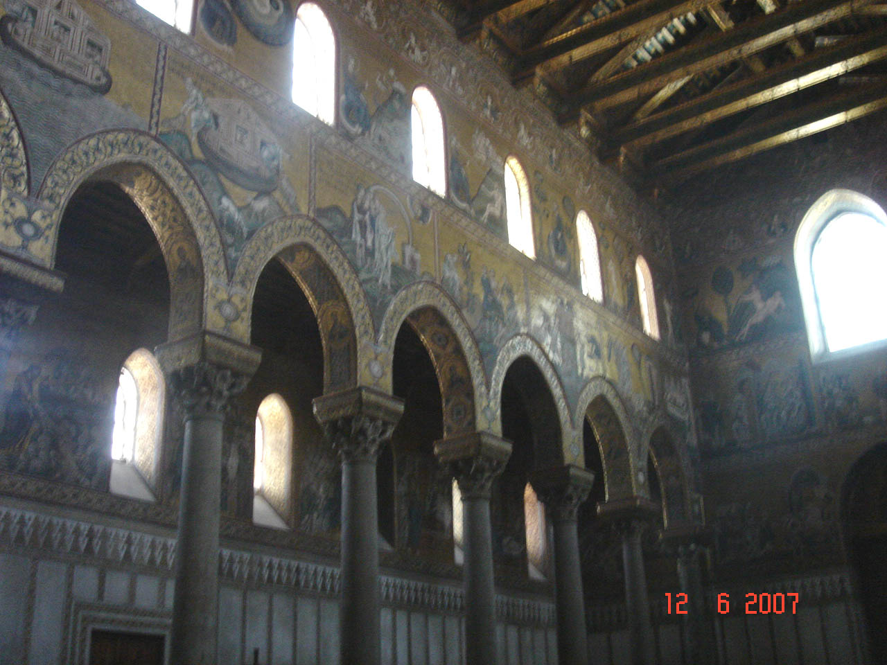 Cattedrale di Monreale, Noah's history. Мозаики нижнего ряда южной стены — история Ноя (продолжение)